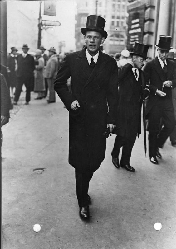 Die Trauerfeier für den verstorbenen deutschen Botschafter in Moskau Graf Brockdorff-Rantzau in der Dreifaltigkeitskirche in Berlin. Der Sohn des deutschen Reichsaußenministers Wolfgang Stresemann, nahm als Vertreter seines Vaters an der Trauerfeier teil.